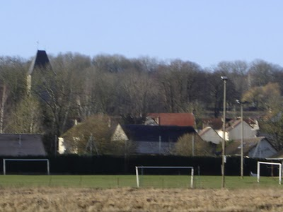 Stade marie Le Blan de Marcq Yvelines